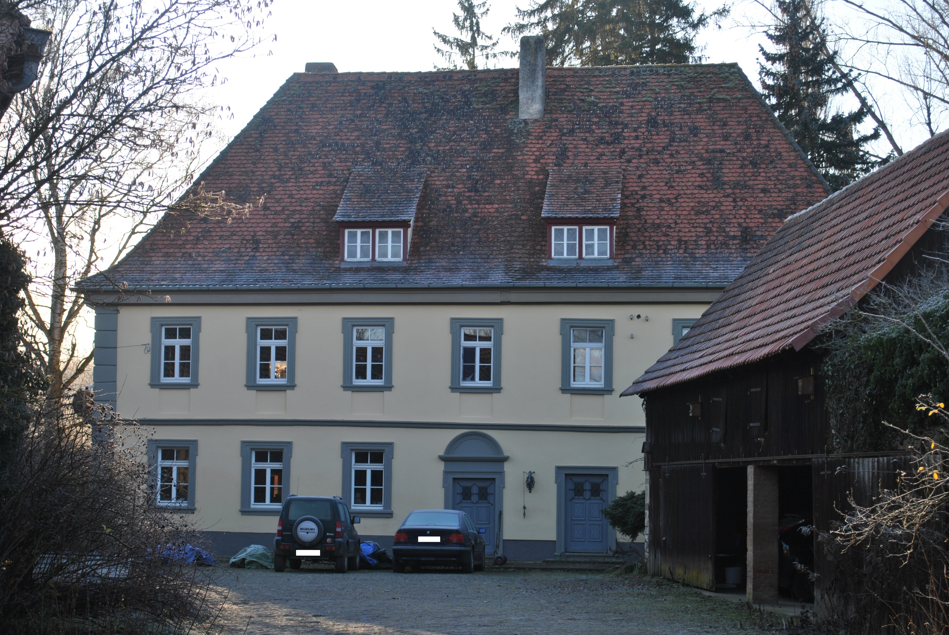 Ehemalige Mühle Zweigeschossiger Walmdachbau mit geohrten Fensterrahmungen, Eckpilastern und Geschossgesims, bezeichnet „1700“